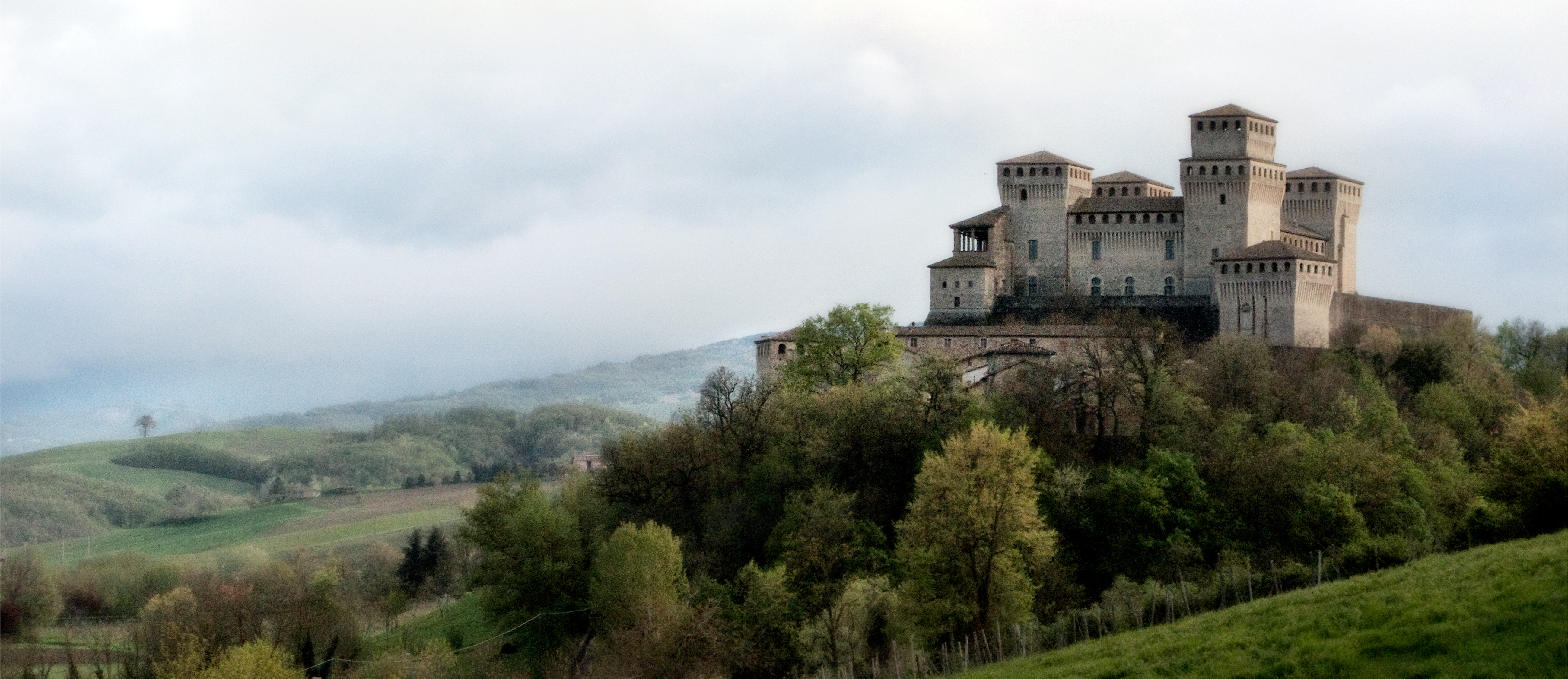 Castello di Torrechiara This is a photo of a monument which is part of cultural heritage of Italy.